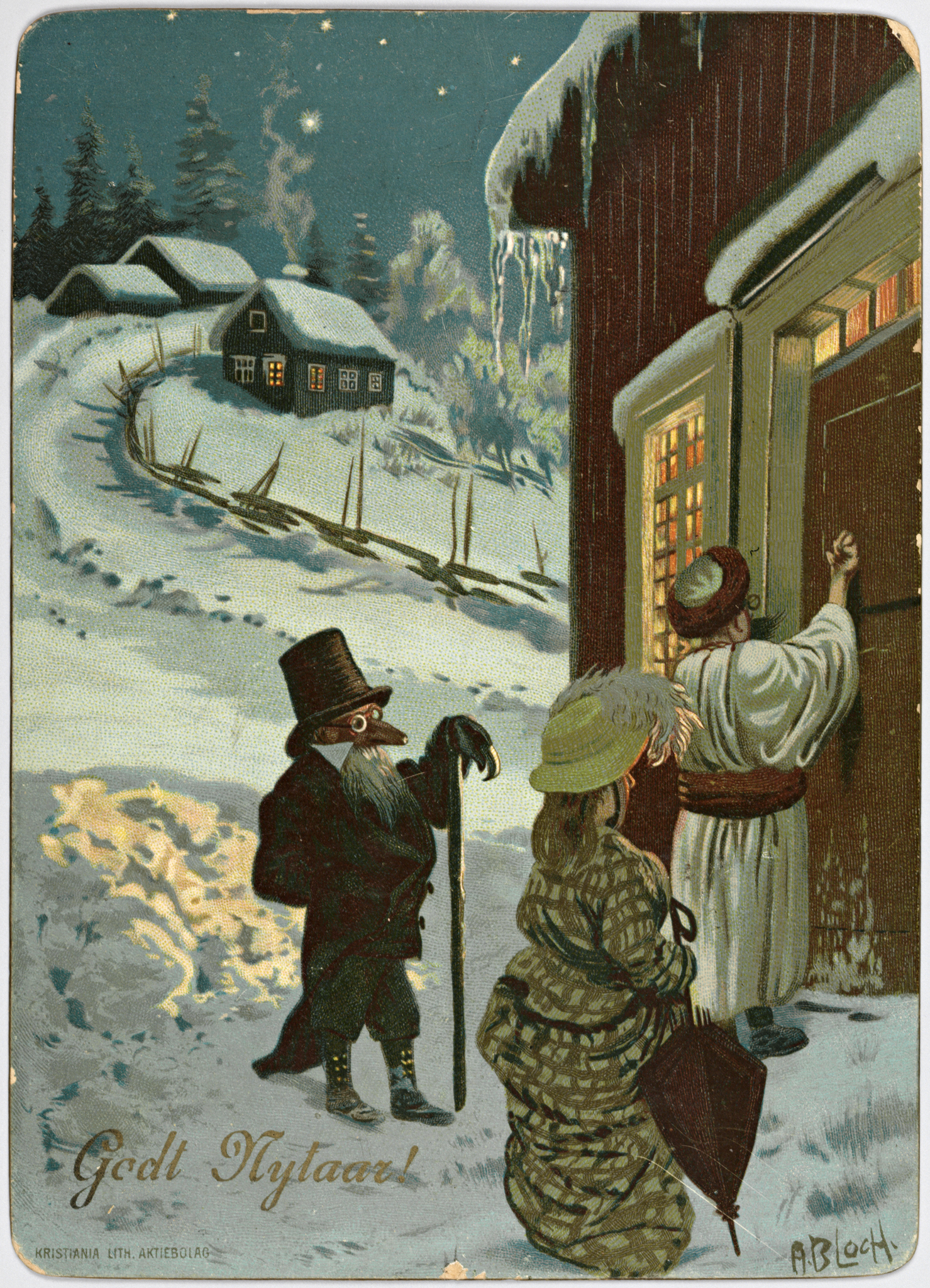 Tittel / Title: Godt Nytaar! Beskrivelse / Description: Kartongkort / postkort / overrekkelseskort. Dato / Kunstner / Artist: Andreas Bloch (1860-1917) Utgiver / Publisher: Kristiania Lith. Aktiebolag Eier / Owner Institution: Nasjonalbiblioteket / National Library of Norway Lenke / Link: Bildesignatur / Image Number: blds_05648